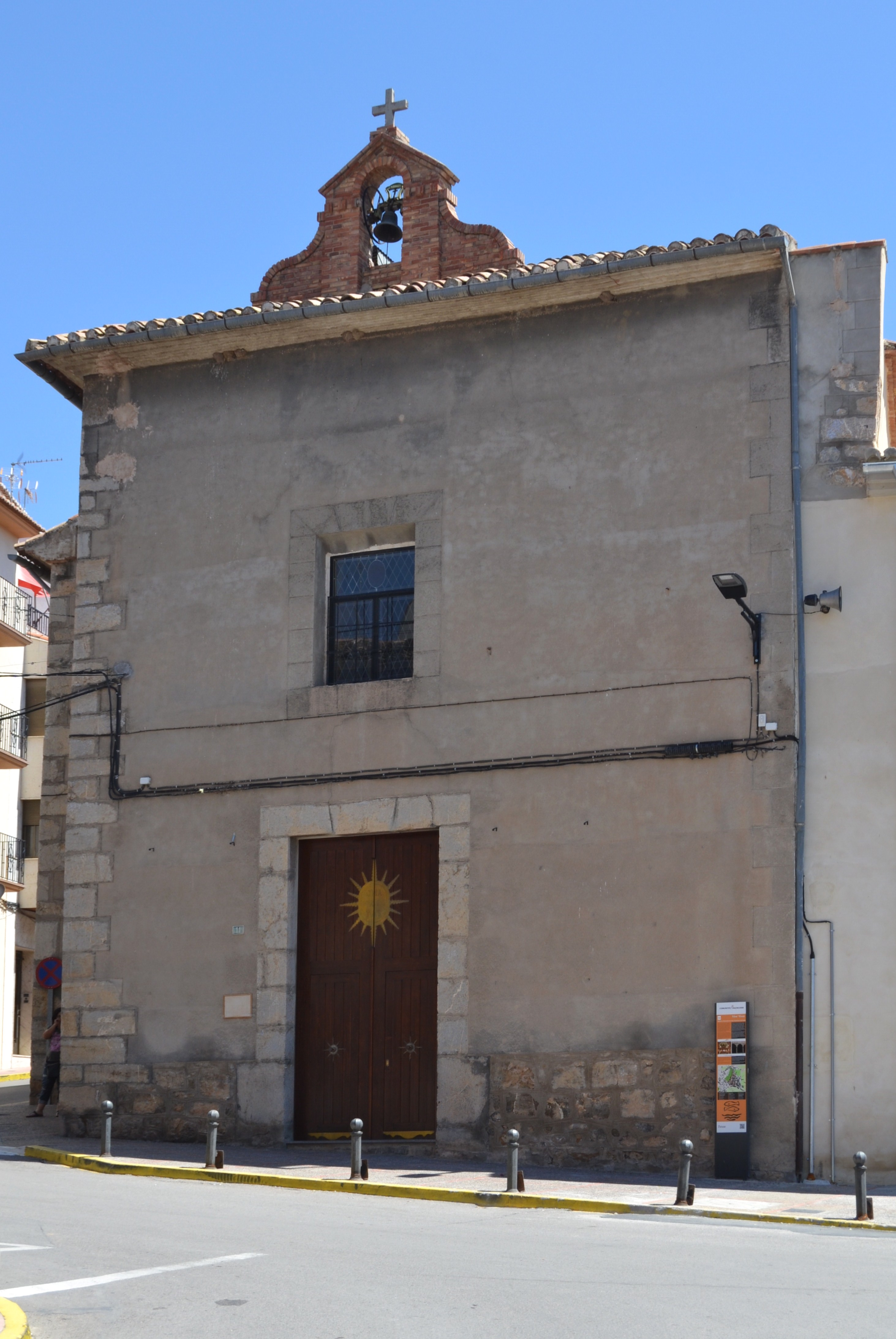 Façana de l'església de sant Francesc de Paula de Viver.